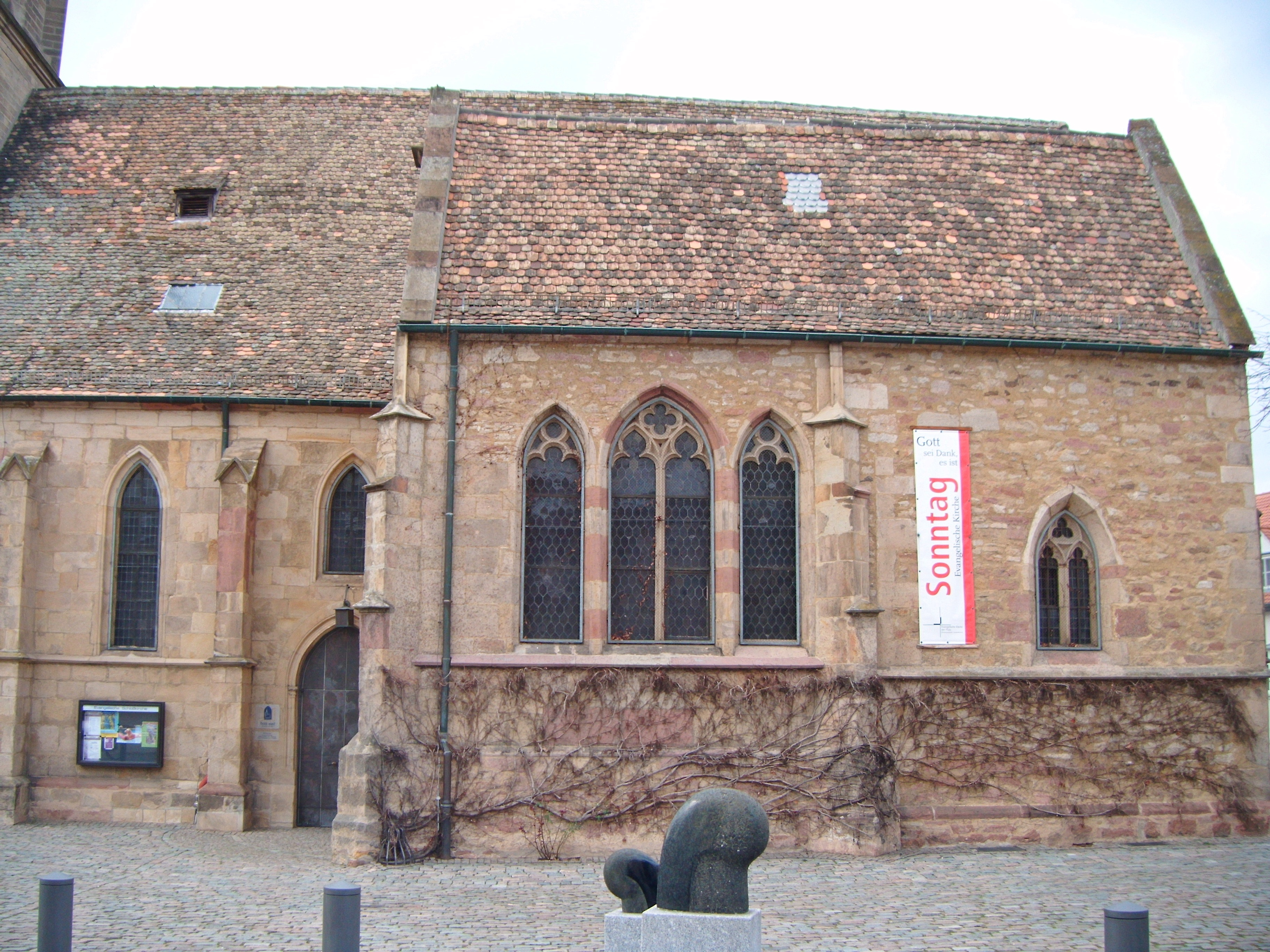 Schlosskirche Bad Dürkheim, Leininger Grabkapelle, um 1505